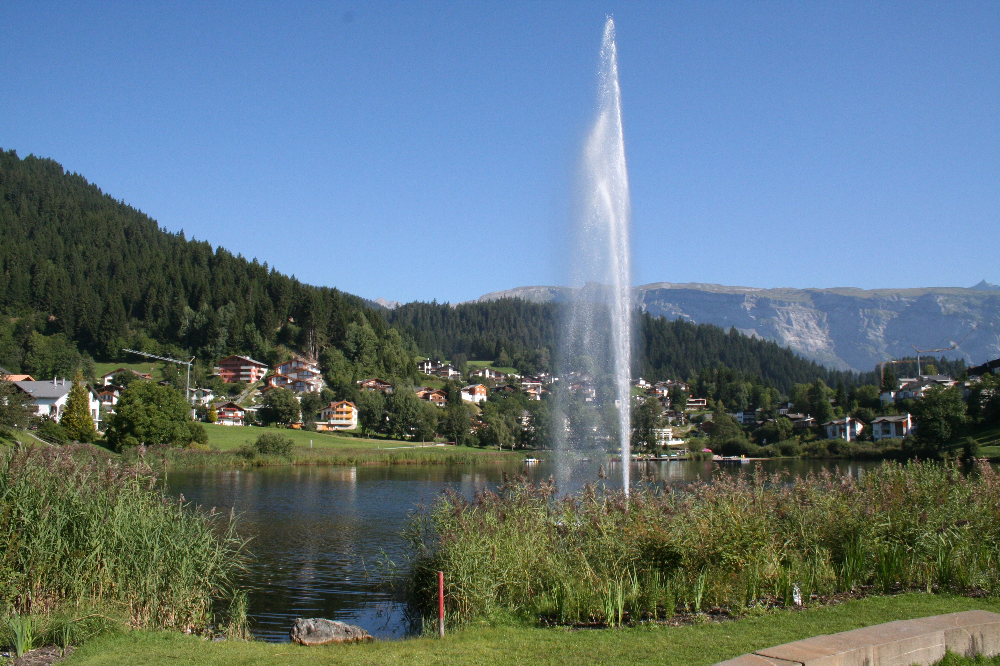 Laaxersee